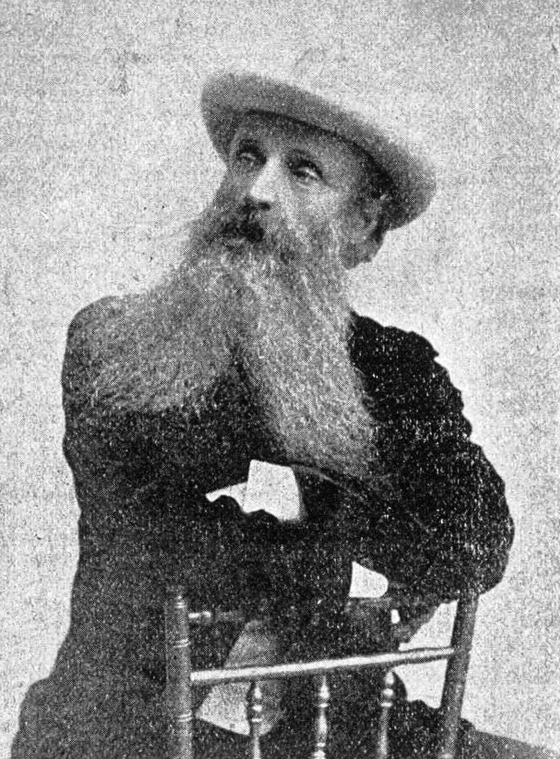 Dominique Ducharme (1840-1899), musicien